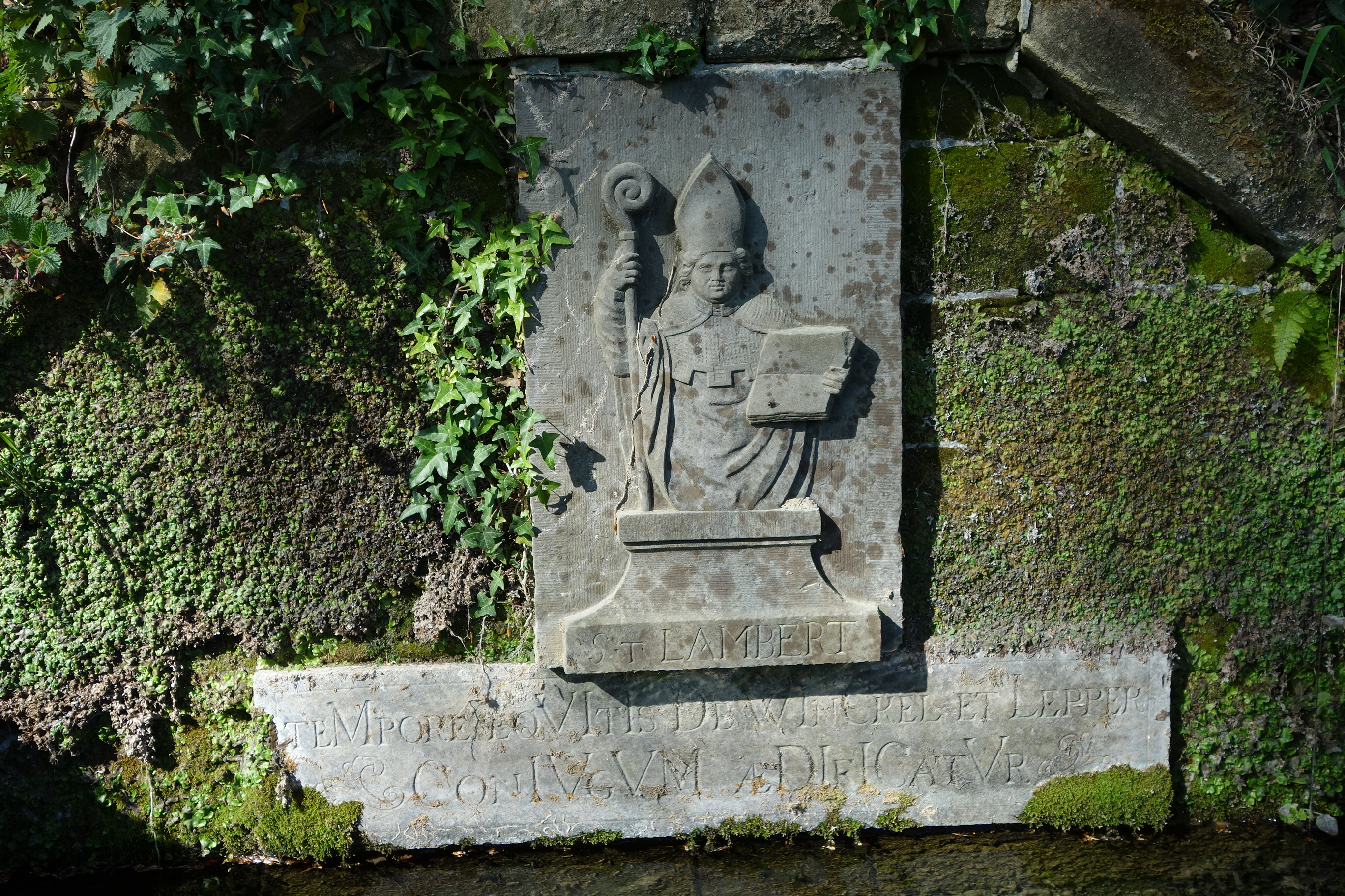 Lambertusbron in Altenbroek, Voeren, België.